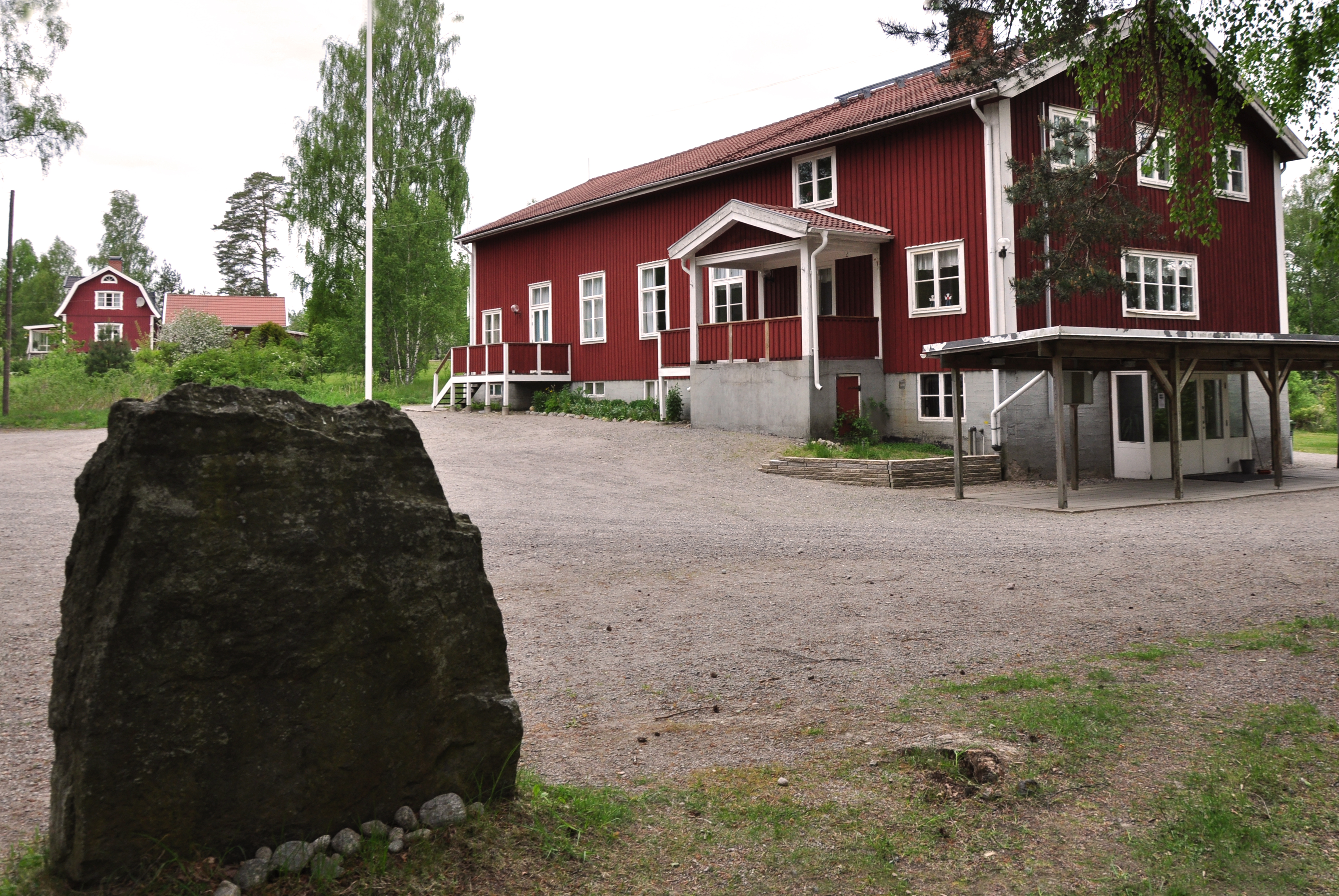 Runsten Sö 297 och dess placering vid Grödinge bygdegård. Stenen är här sedd från baksidan.